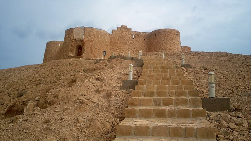 قلعه جلال الدین در فاصله پنج كيلومتري شرق شهرستان جاجرم، یکی از برجسته ترین قلعه های نظامی خراسان شمالی محسوب می شود که در سده های ششم تا هفتم هجری ساخته شده است.